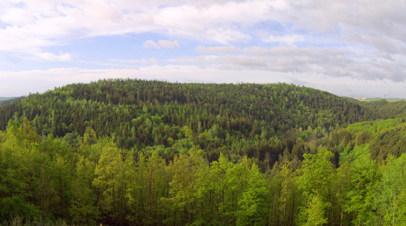 Vrch Hradiště nedaleko Lhoty a Slatiny od severu.